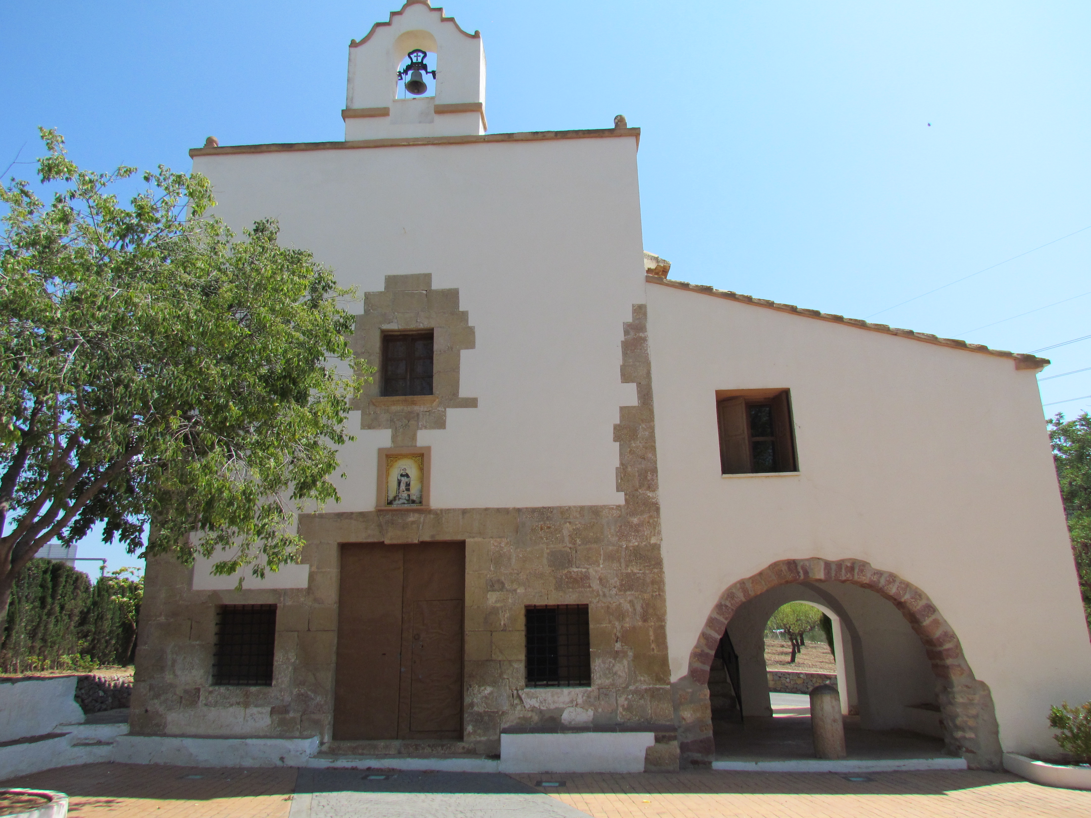 Ermita de Sant Vicent Ferrer de Borriol, Plana alta (País Valencià)